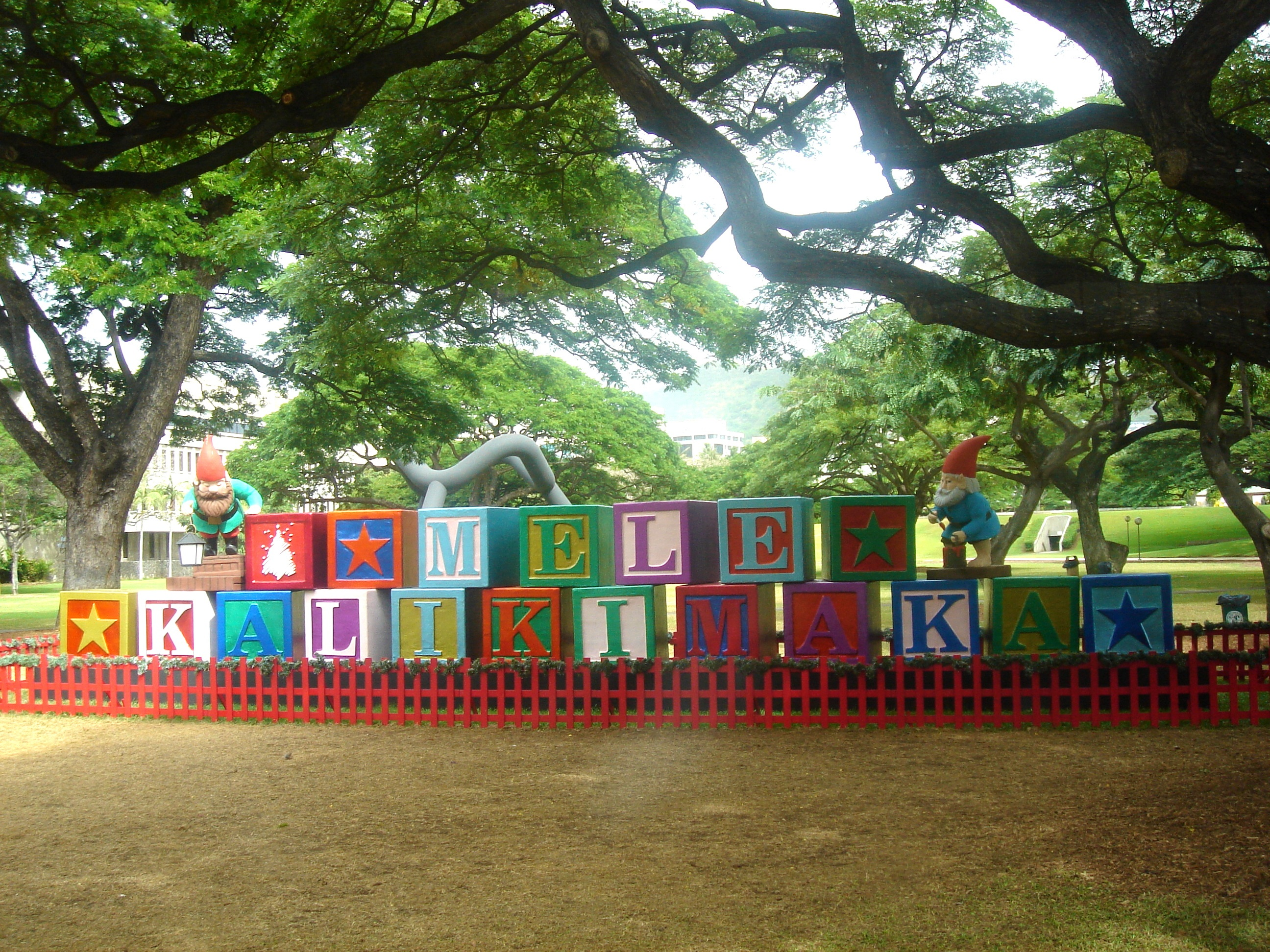 "Mele Kalikimaka"はハワイ語で"Merry Christmas"。